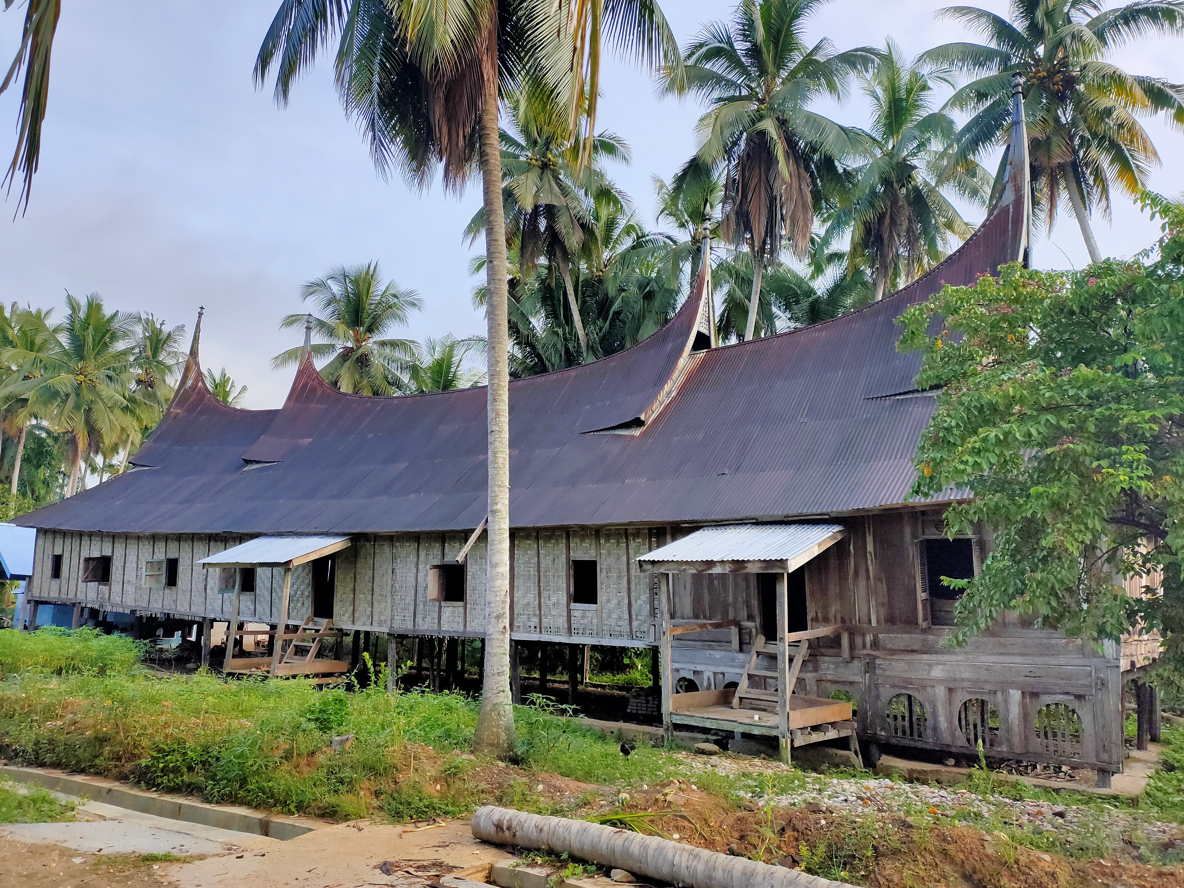 Rumah Gadang Nan Panjang Suku Kalumpang Nagari Palangki, Kabupaten Sijunjung, Sumatera Barat